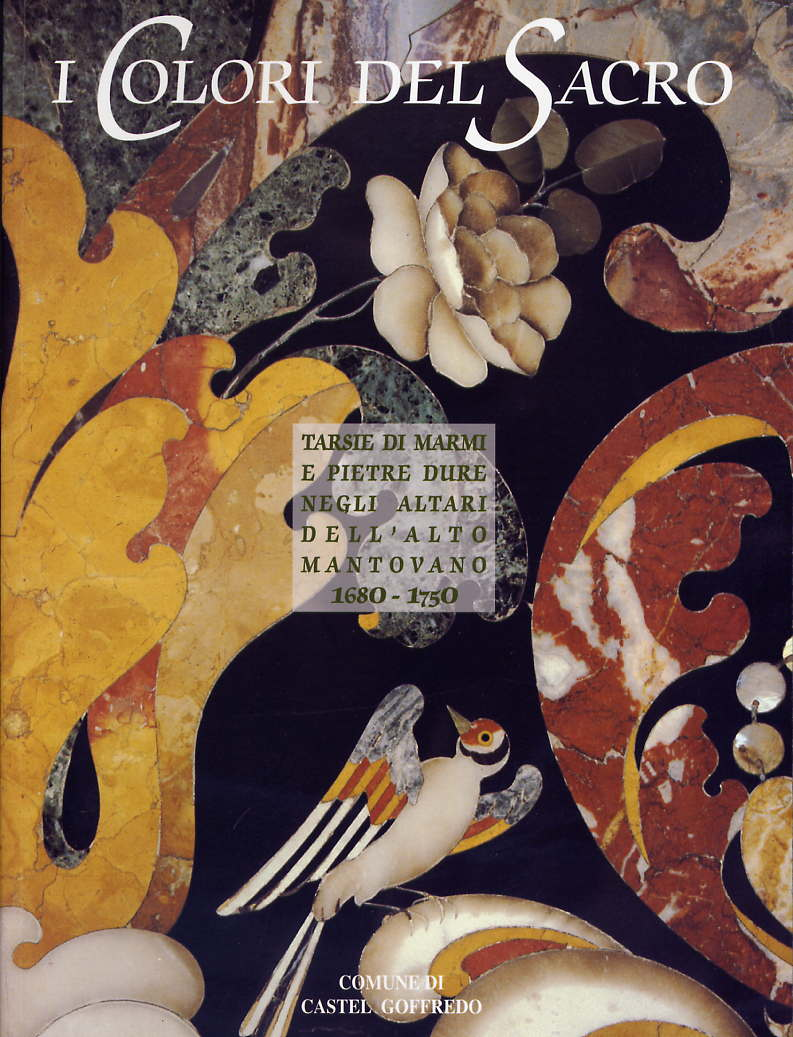 Copertina del volume "I Colori del Sacro", 1997